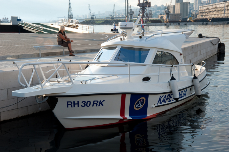 Kapetanija u riječkoj luci